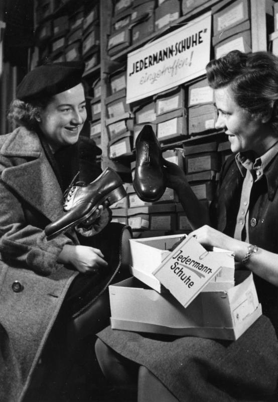 Hamburg, Verkauf von "Jedermann-Schuhen" Jedermann-Schuhe eingetroffen ... Die ersten Schuhe, die im Rahmen des Jedermann-Programms hergestellt werden, sind jetzt eingetroffen und fanden zum Preis von DM 23,75 und DM 26,50 für die Damen-, bezw. Herrenschuhe reissenden Absatz. Unser Bild zeigt den Verkauf von "Jedermann-Schuhen" in einem Hamburger Schuhgeschäft. 2-11-48 Illus-dpd 2402-48